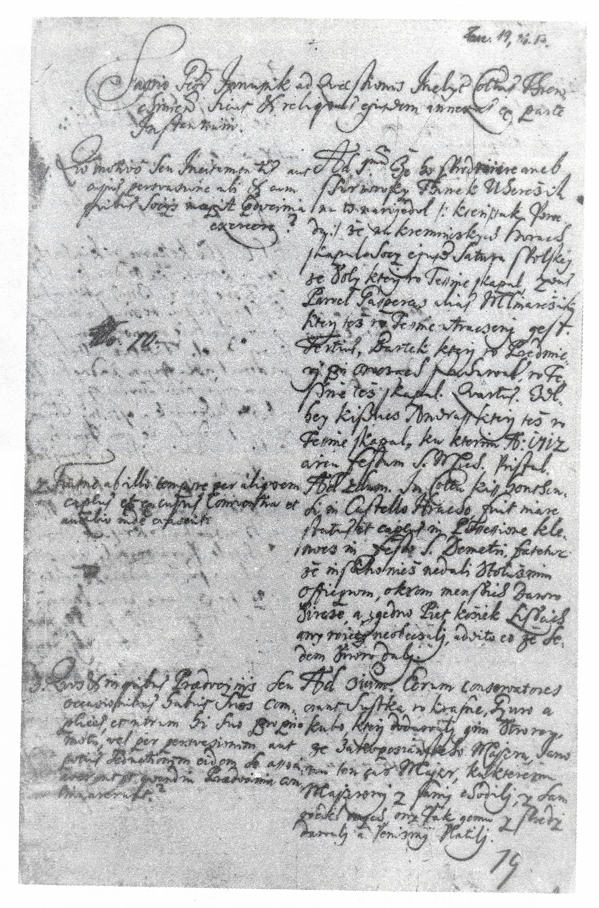 Faksimile dokumentu o uväznení slovenského národného hrdinu Juraja Jánošíka a jeho spoločníka zbojníka Tomáša Uhorčíka v hrachovskom kaštieli. Jánošík bol ešte pred súdom v Liptovskom Mikuláši väznený na jeseň roku 1712 v hrachovskom kaštieli, z ktorého utiekol